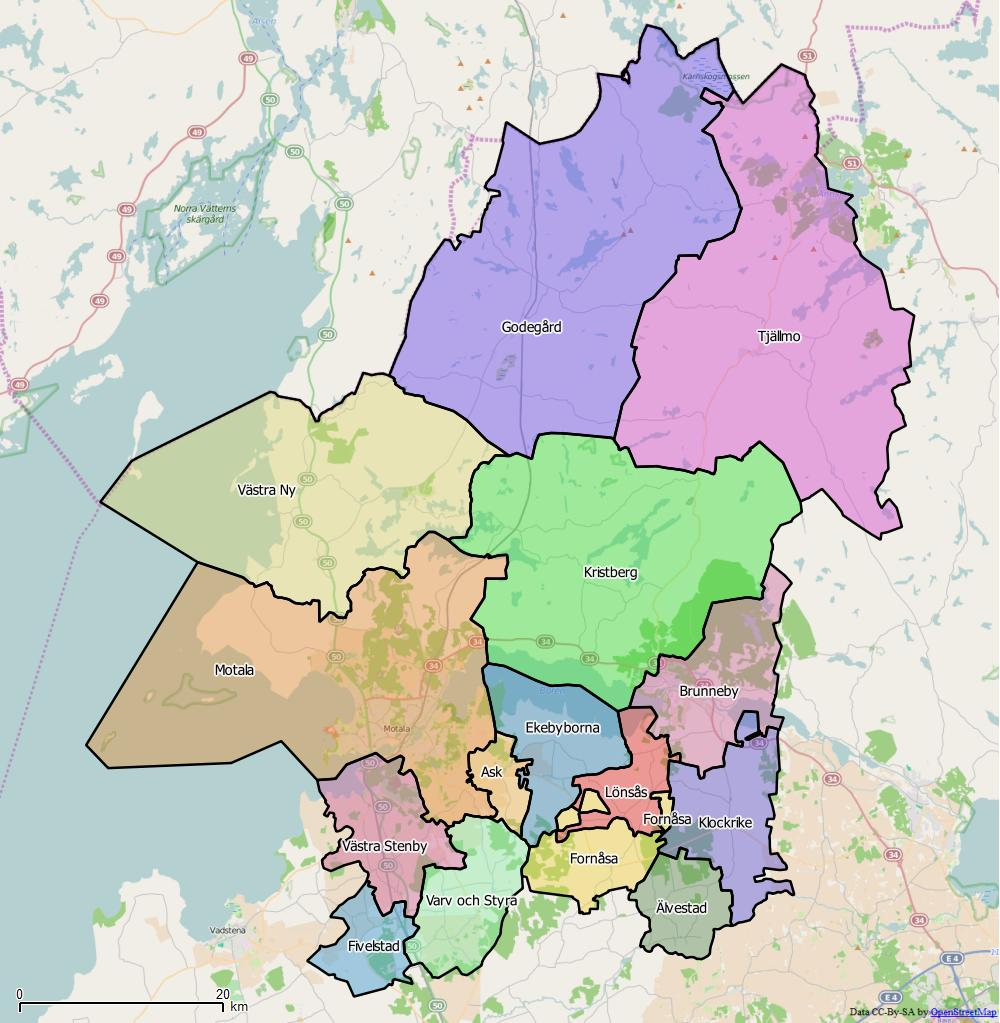 Distriktsindelningen i Motala kommun World file: 98.51467425287687263 0 0 -98.51467425287687263 1635341.25691309897229075 8153702.1897345669567585